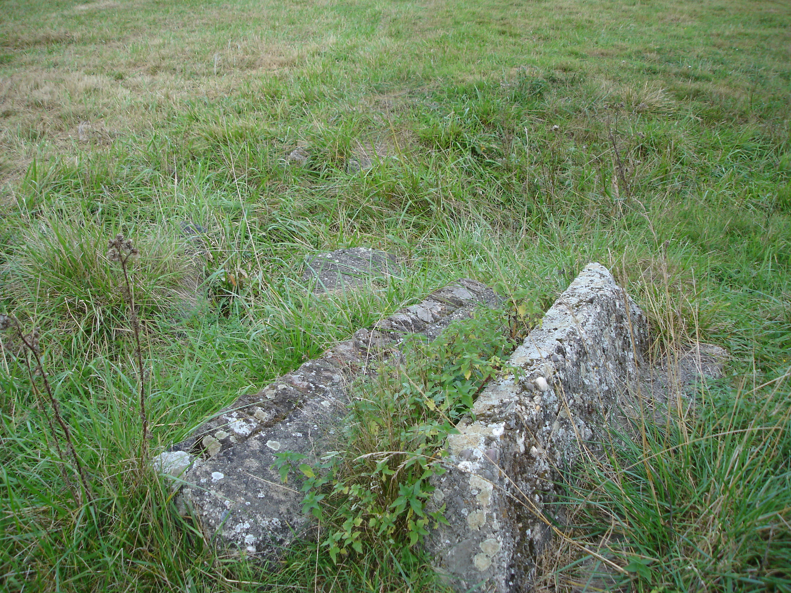 Betonreste einer befestigten Startbahn in Richtung Nordost auf dem ehemaligen Flugplatz Handorf in Münster, Deutschland